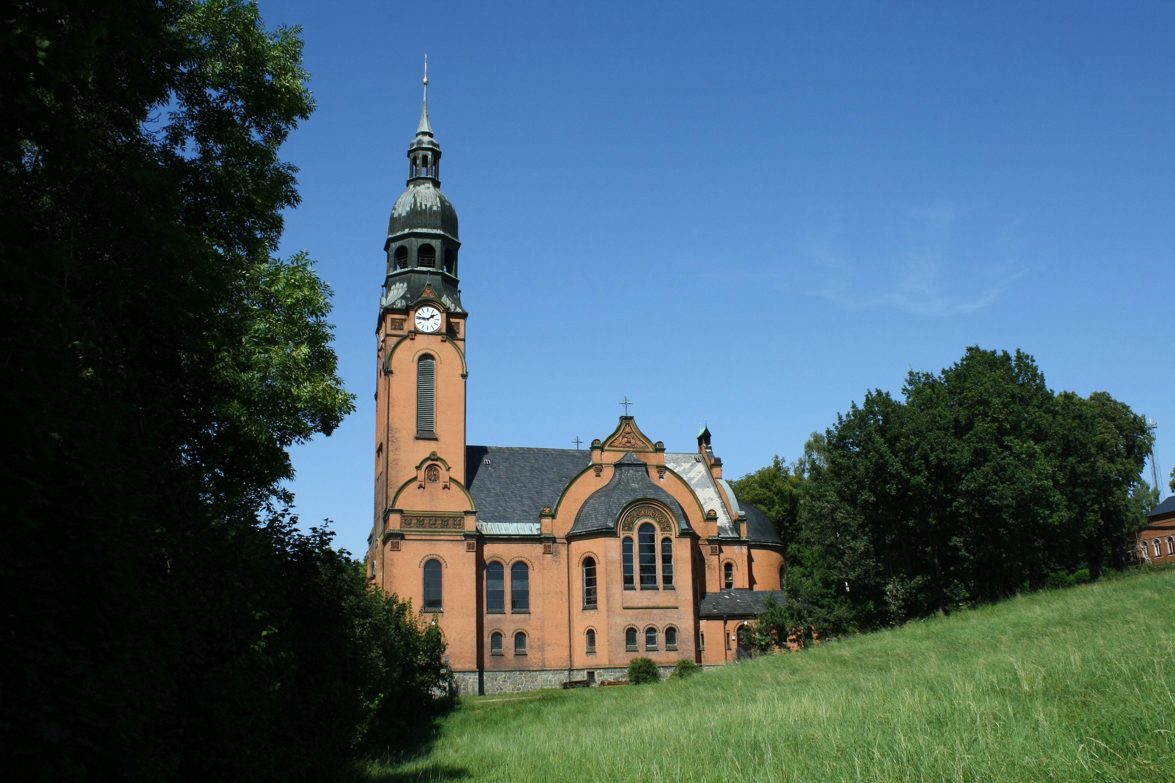 Ansicht Lutherkirche Chemnitz-Harthau 2009